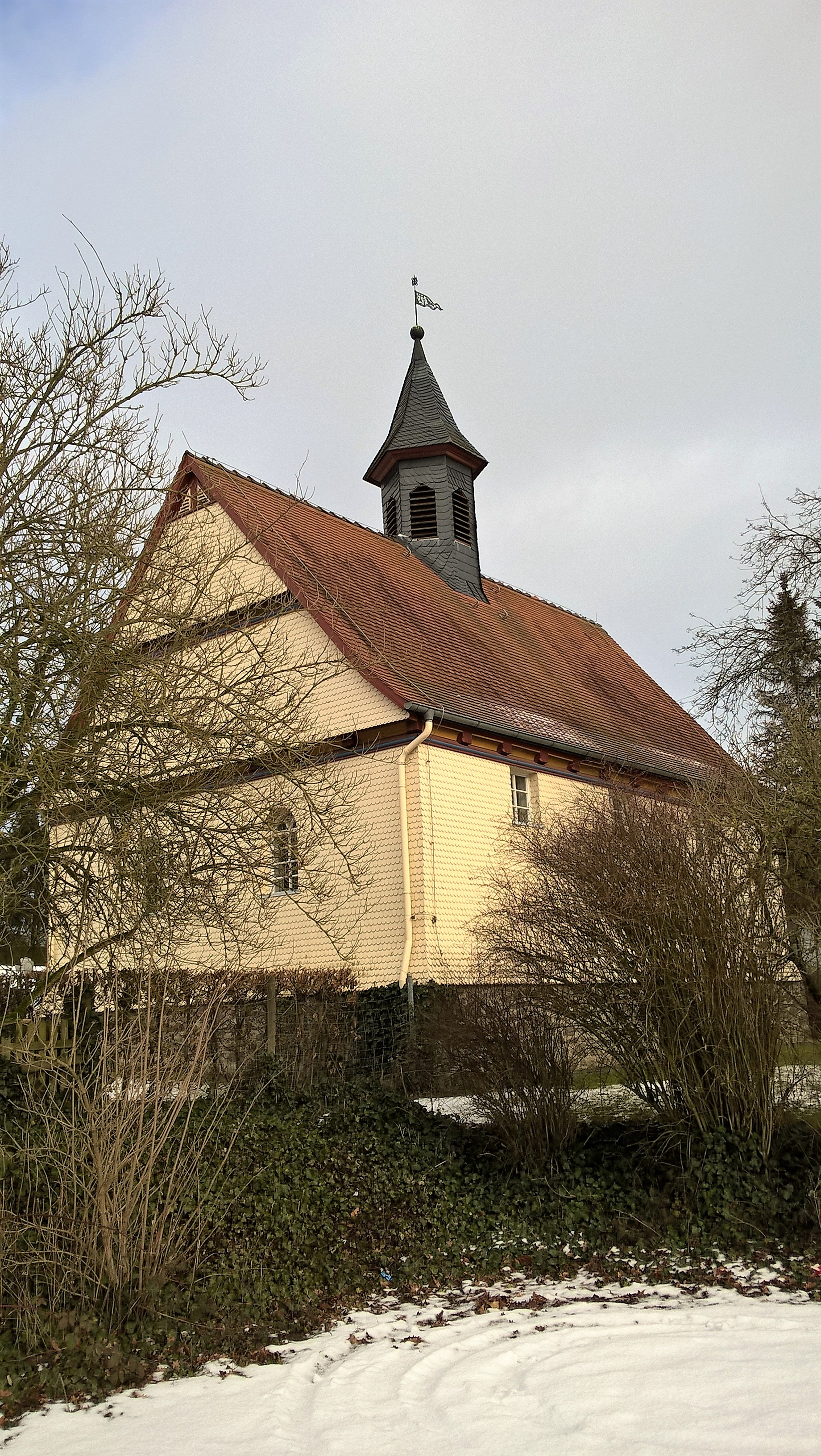 Evangelische Kirche Ilsdorf (ursprünglich Bernsfeld), Gemeinde Mücke, Vogelsbergkreis, Hessen, Deutschland